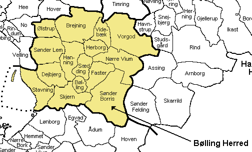 Bølling Herred, Ringkøbing Amt, Denmark